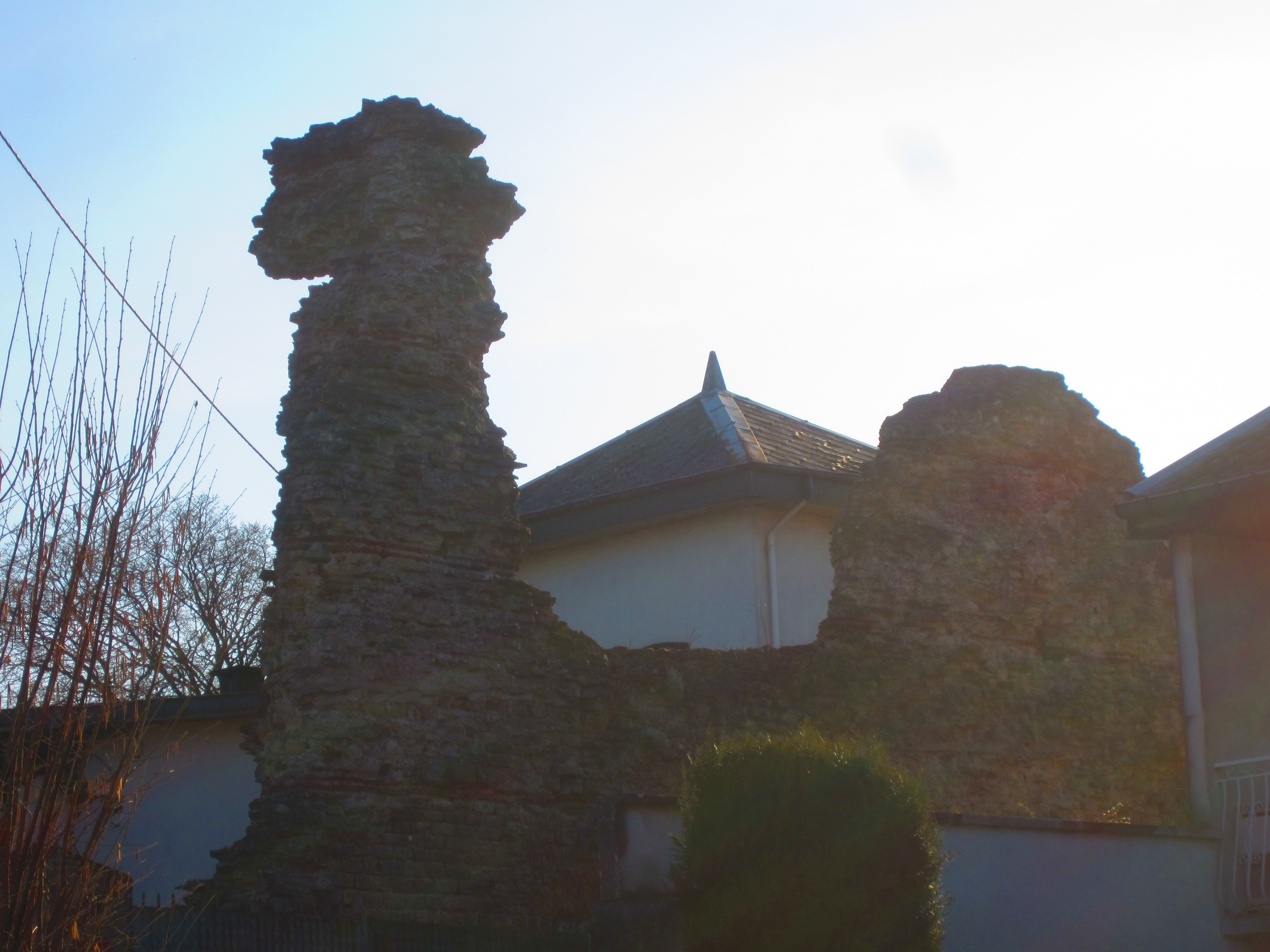 Deneuvre tour